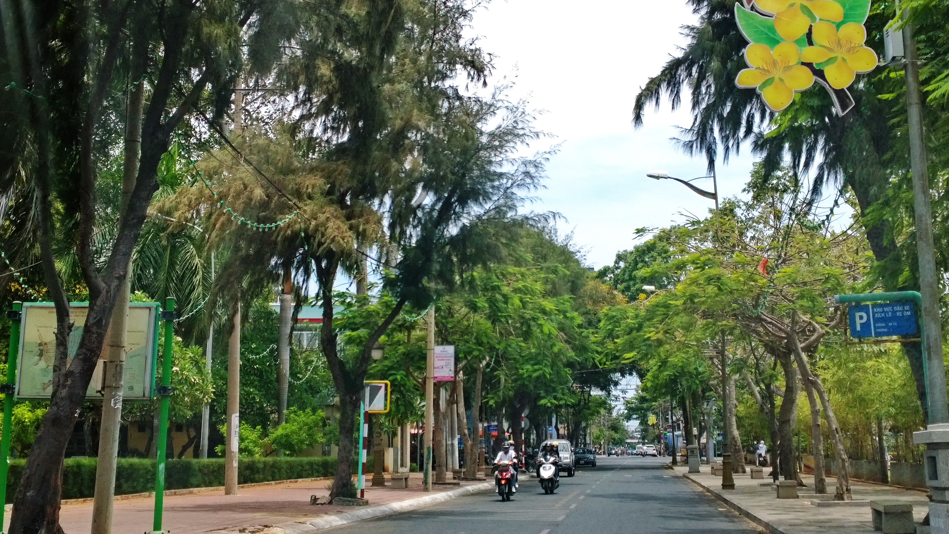 Bacu street-Phường 1, tp. Vũng Tàu, Bà Rịa - Vũng Tàu, Việt Nam